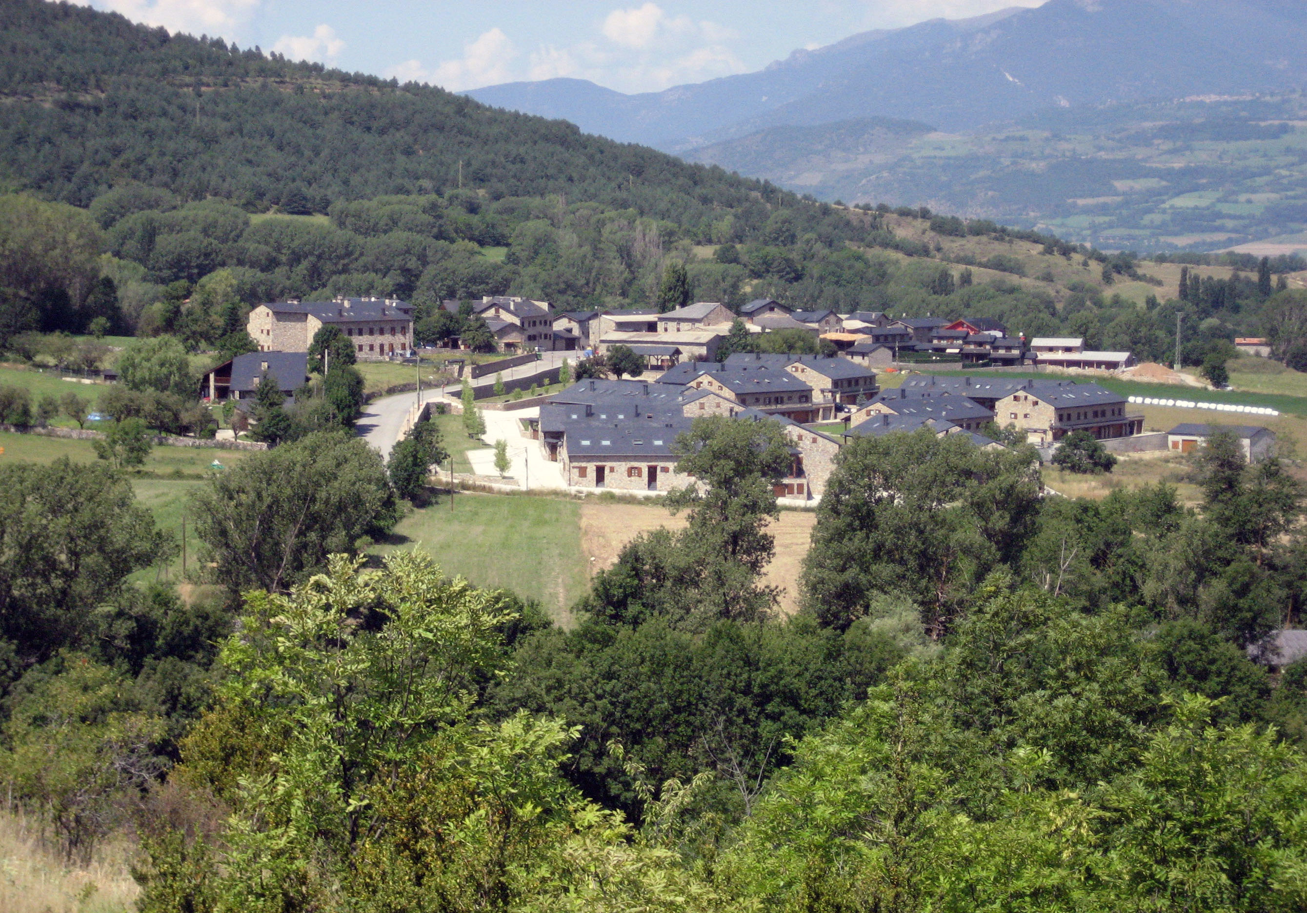 Bor, entidad de población de la Baja Cerdaña (Cataluña) España